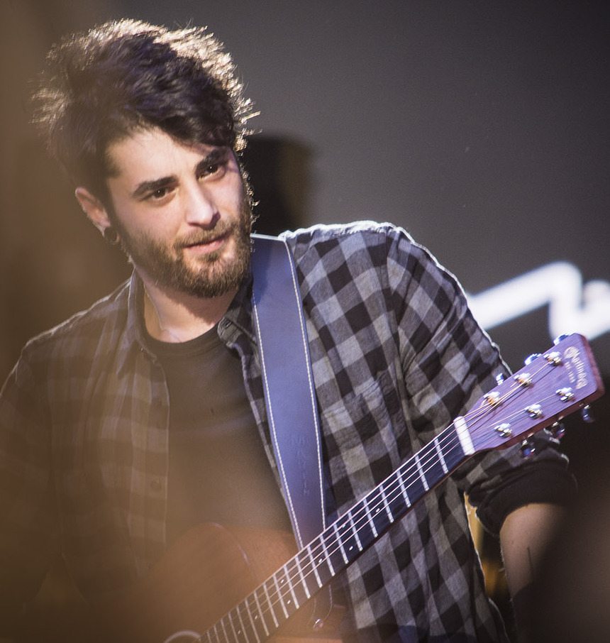 Giosada live